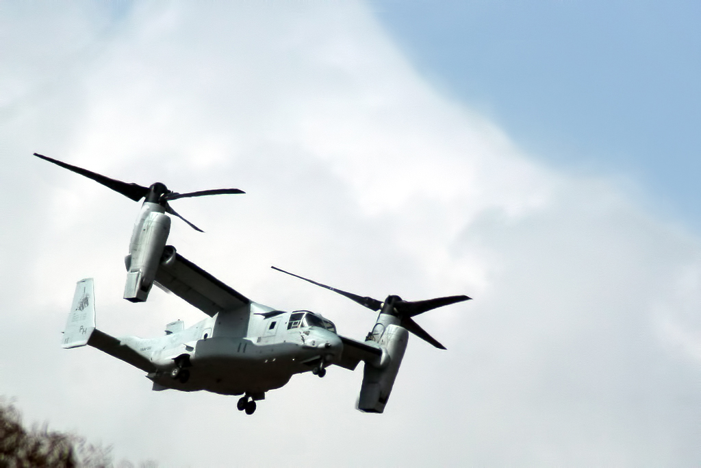 Bell-Boeing V-22 Osprey US Marines 8218